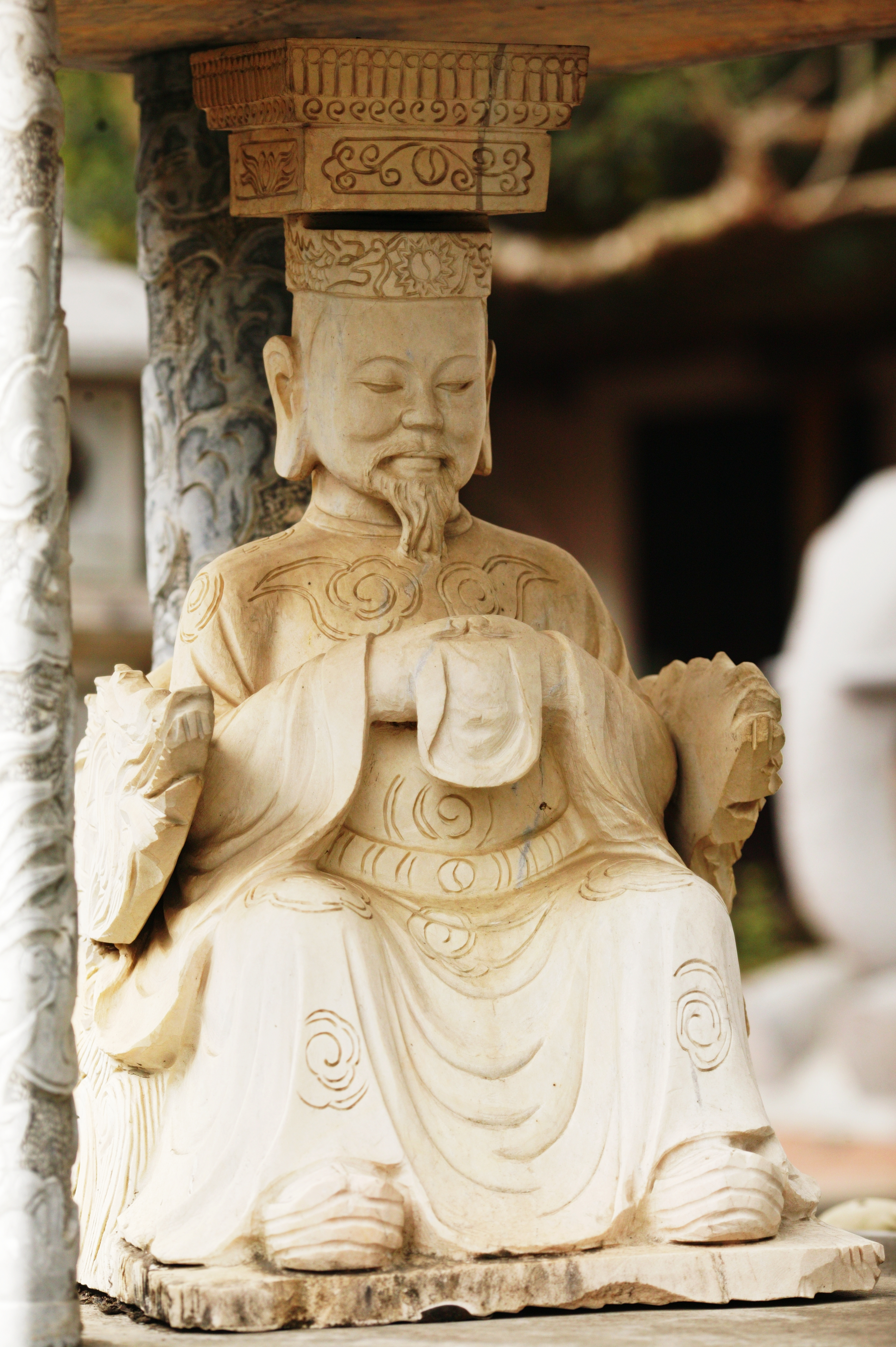 Mộc-tượng Trần-triều Dụ-tông Hiếu hoàng-đế tại chùa Gệt.